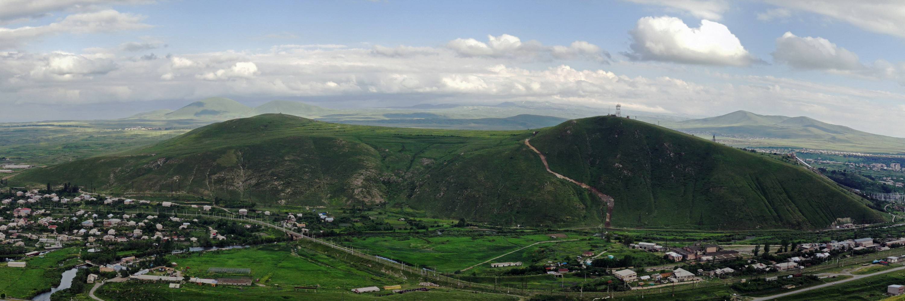 Mounts Sudaghyan (1922 m) & Klordar (1921 m)